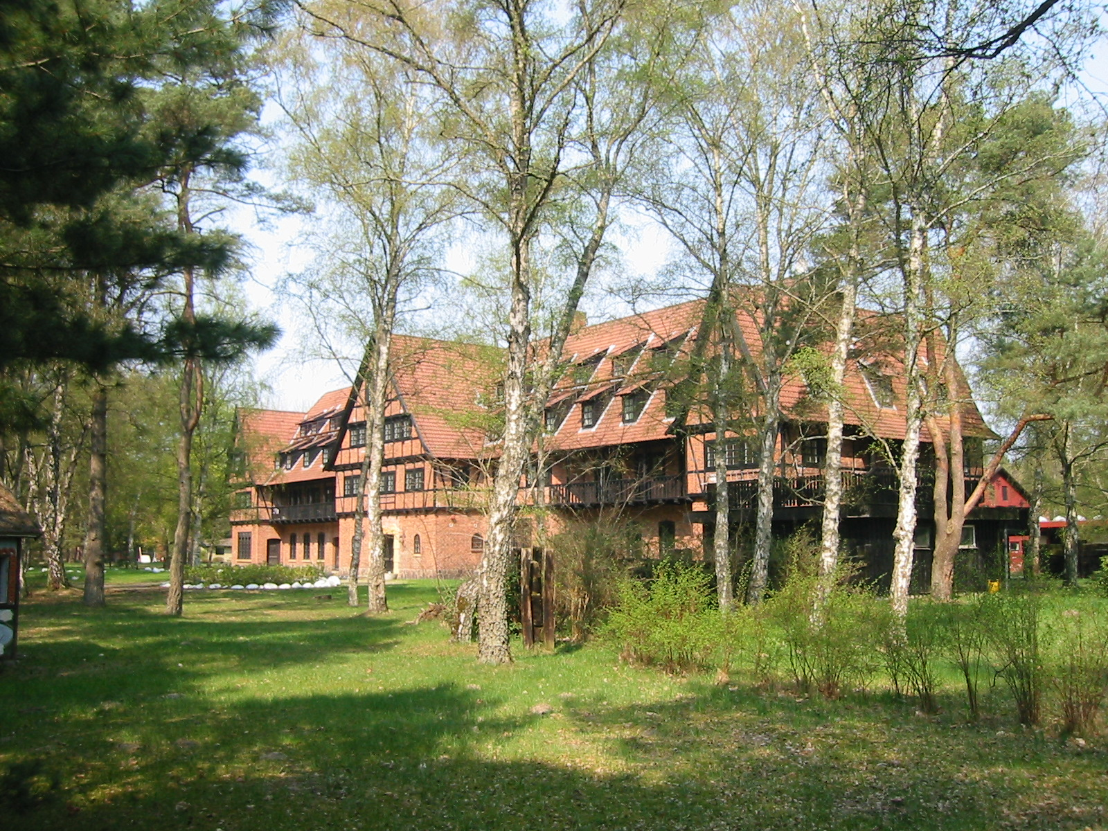 Asserbohus forside